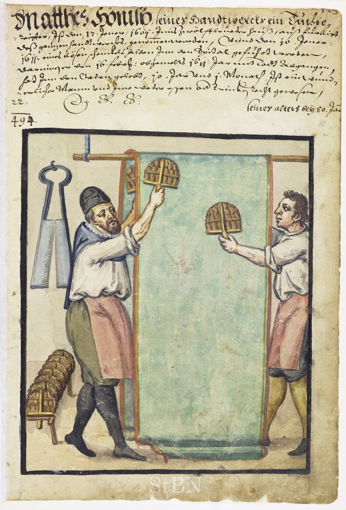 Matthes (Mathes; Matthias) Hönish (Hönisch), Tuchbereiter (Tuchbereiter; Tuchmacher) Transkription und weitere Informationen